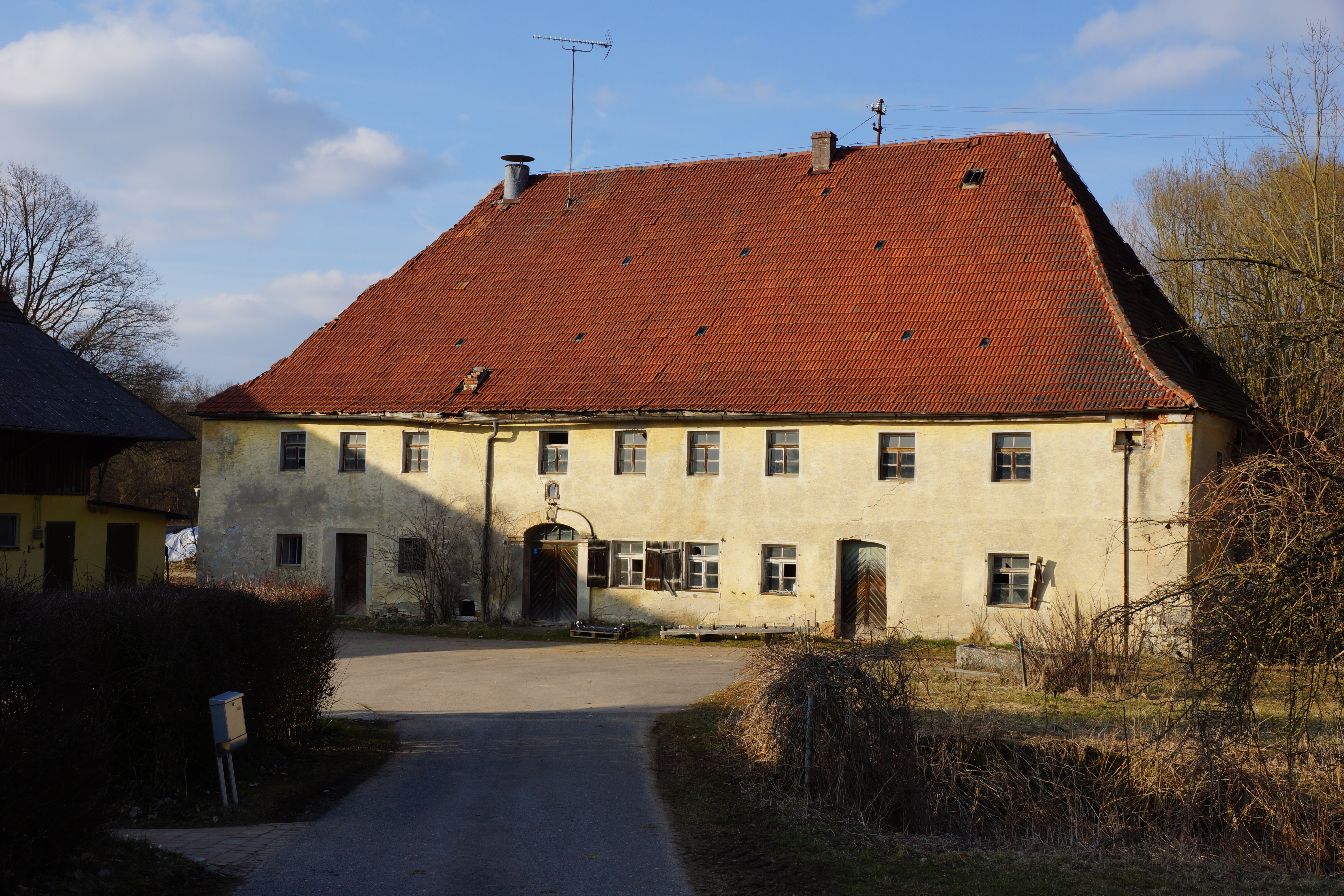 Iberlsmühle nördlich von Neumarkt